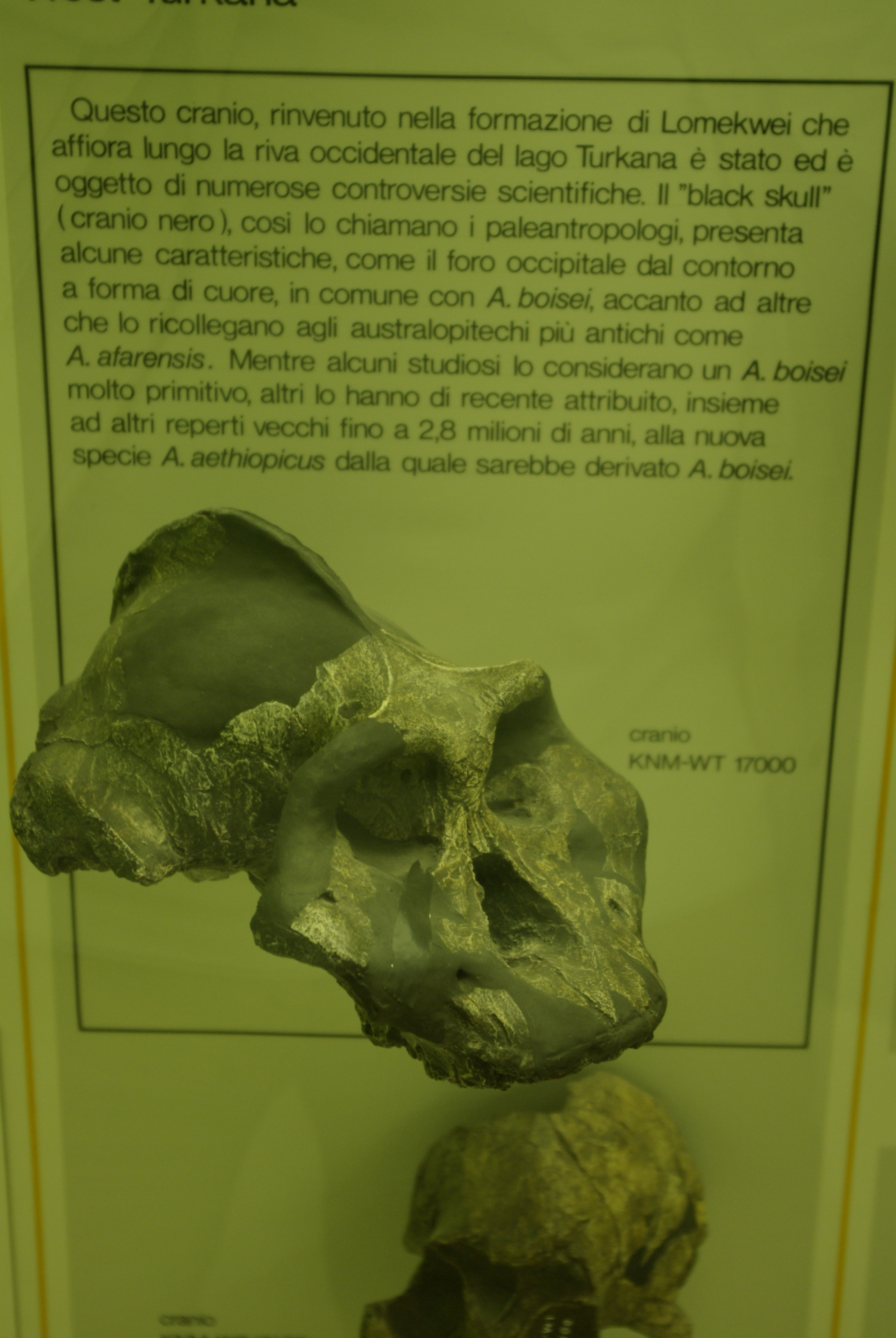 Museo civico di storia naturale This is a photo of a monument which is part of cultural heritage of Italy.